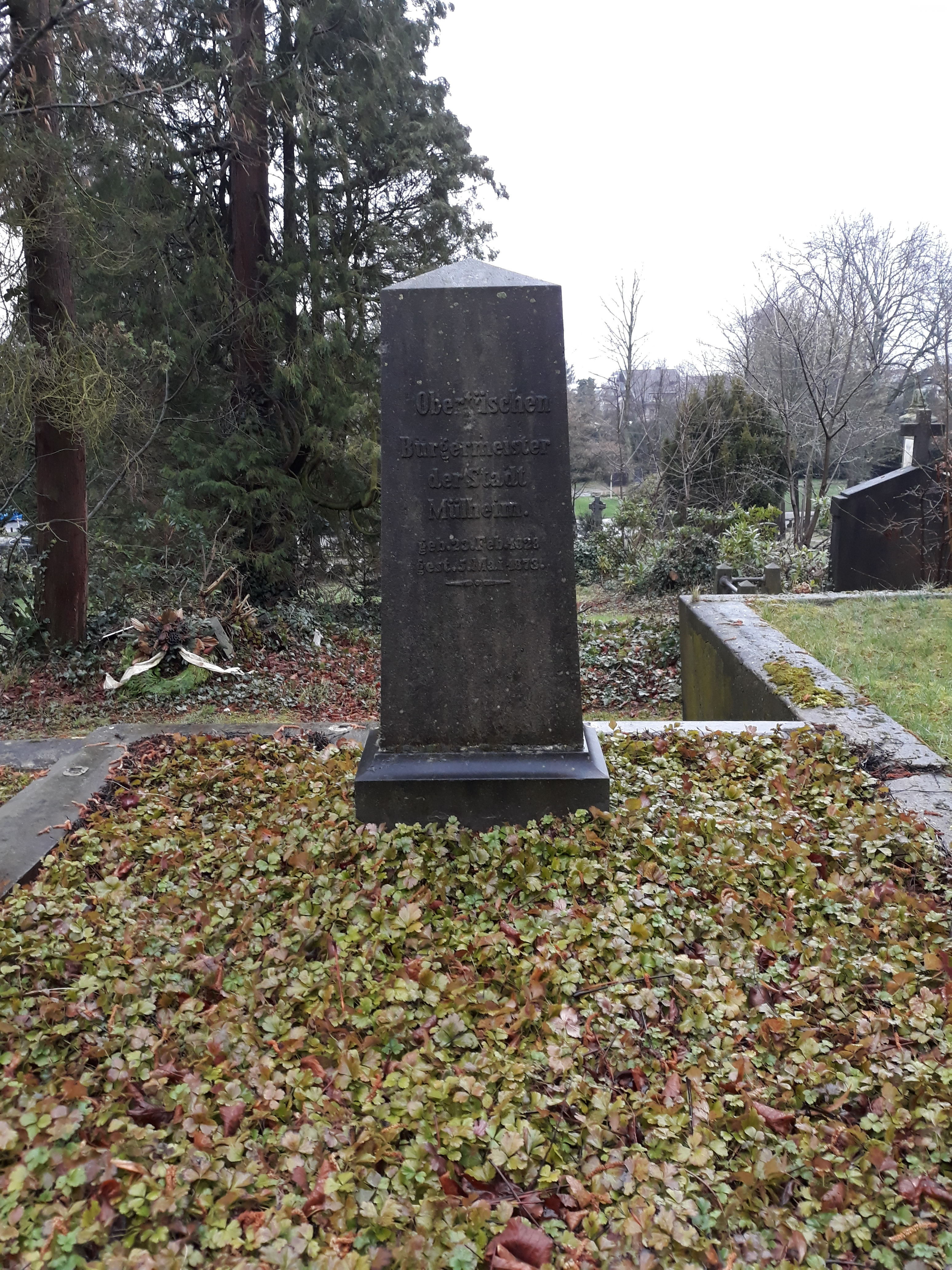 Das Grab des Bürgermeisters von Mülheim an der Ruhr, Karl Obertüschen, auf dem Alten fredehof Mülheim an der Ruhr.